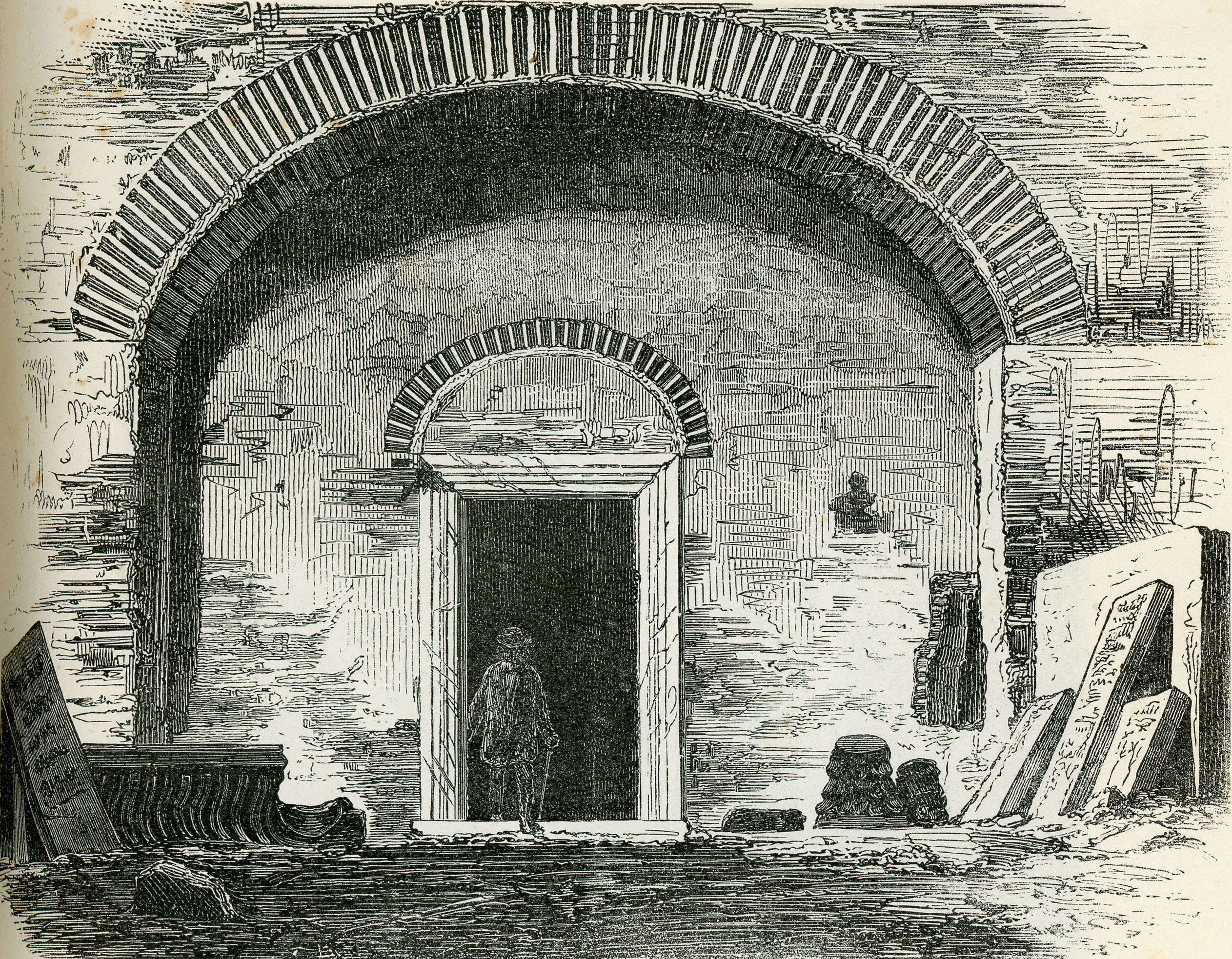 Roma: interno delle Catacombe di San Sebastiano (incisione).